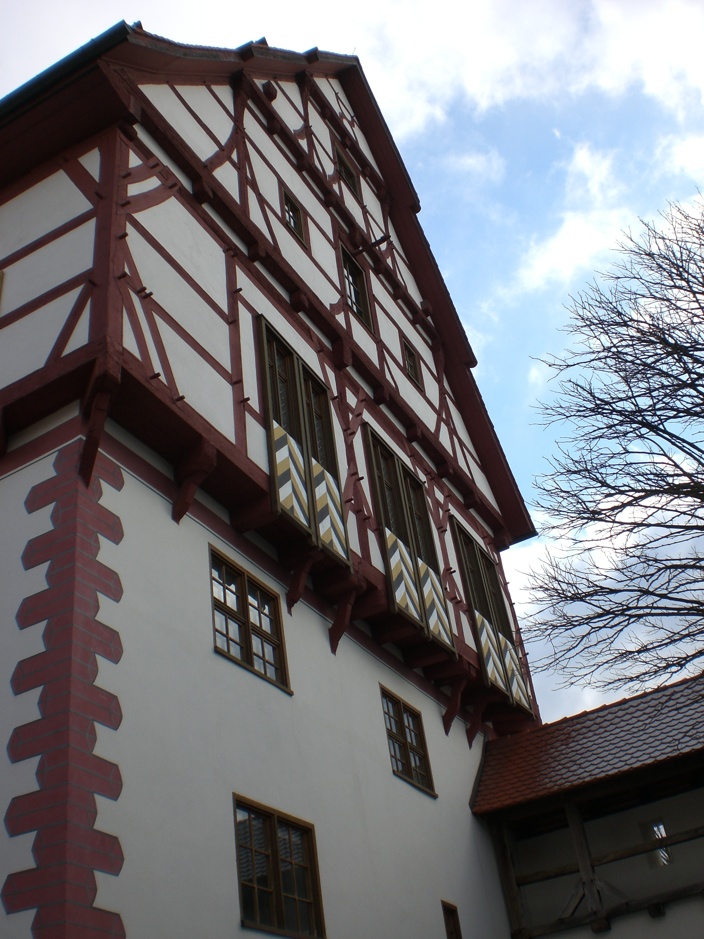 Spital Schelklingen, Deutschland.